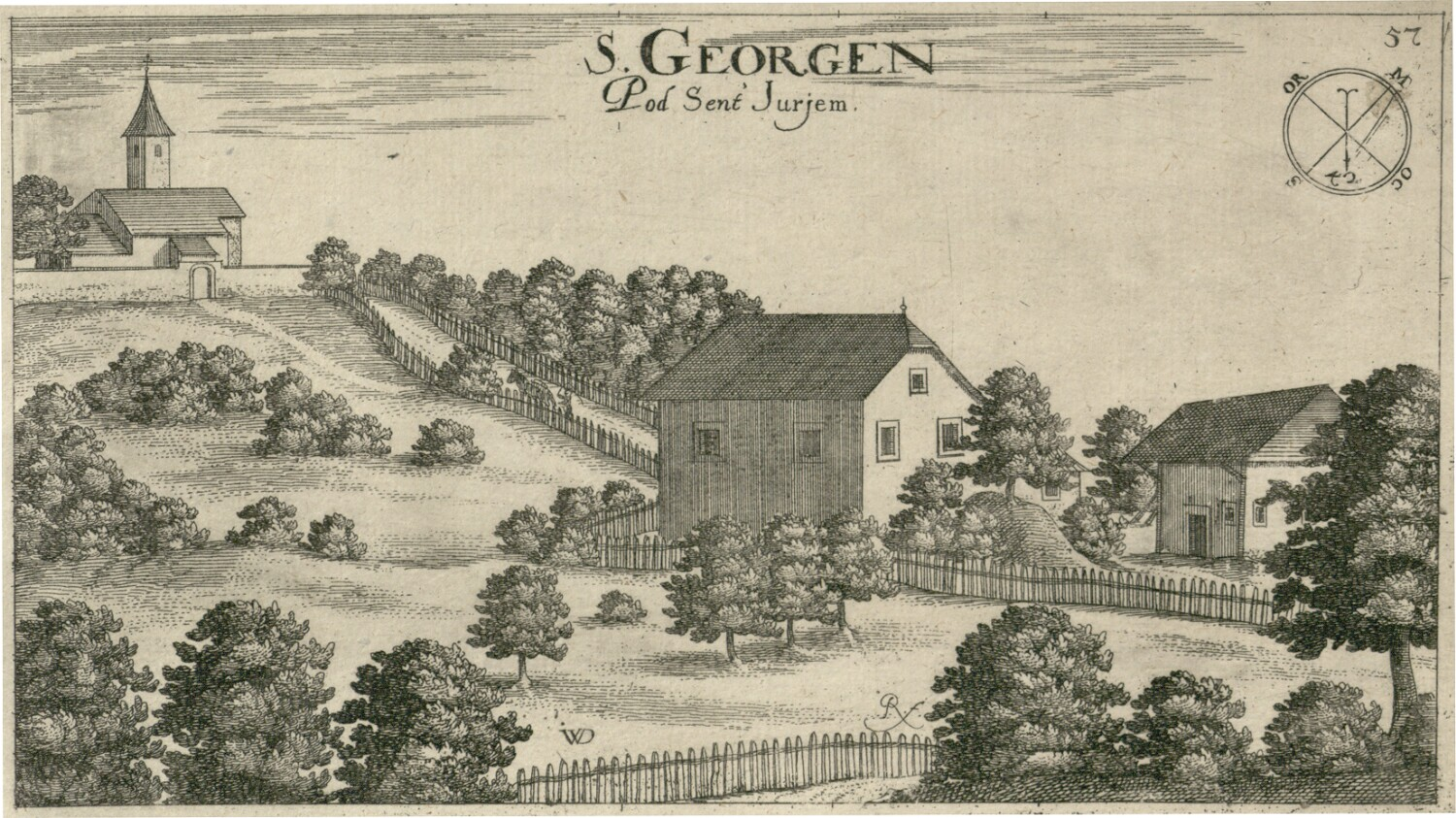 Dvorec Podšentjur